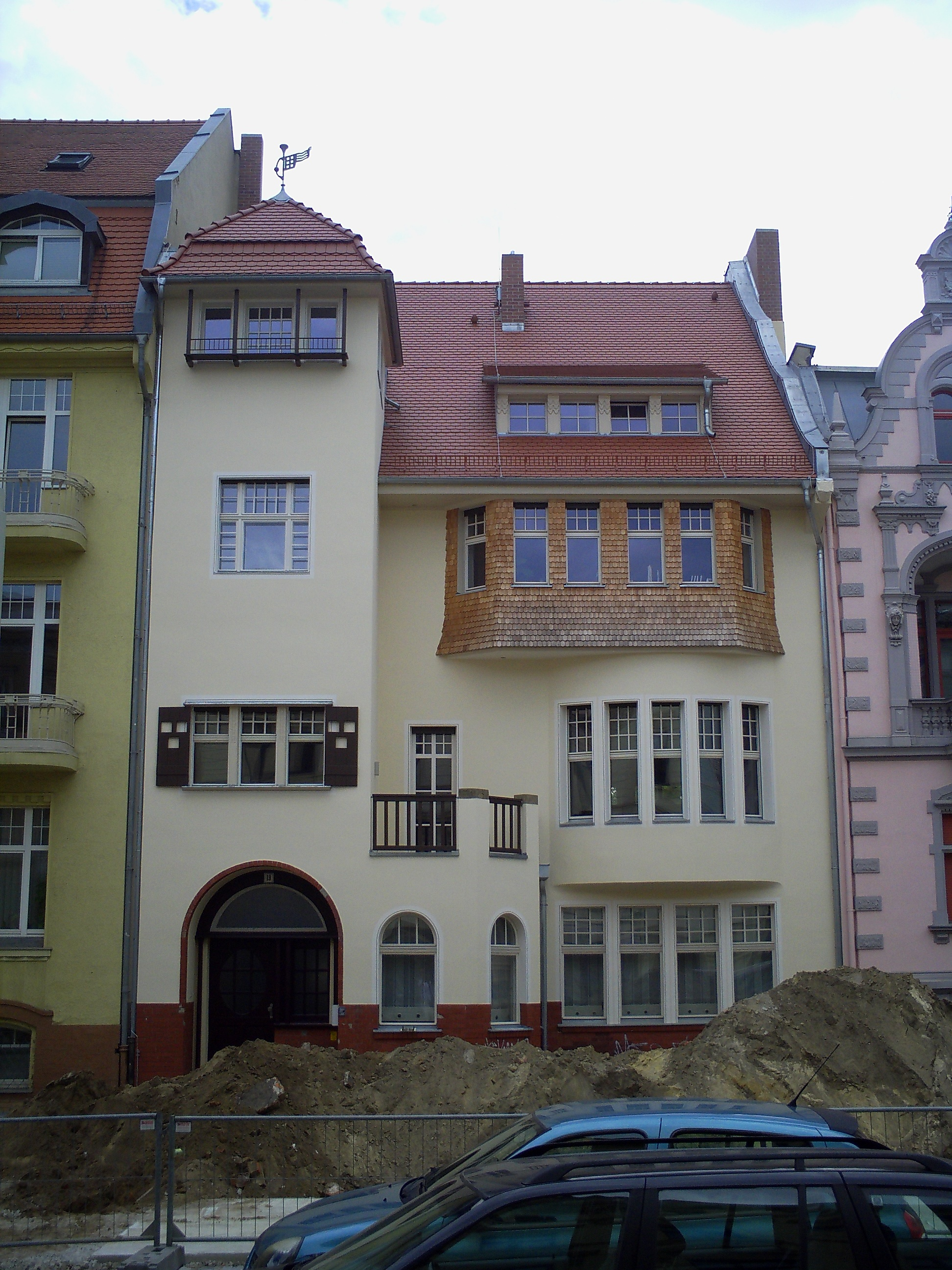 Bahnhofstraße 19 in Cottbus